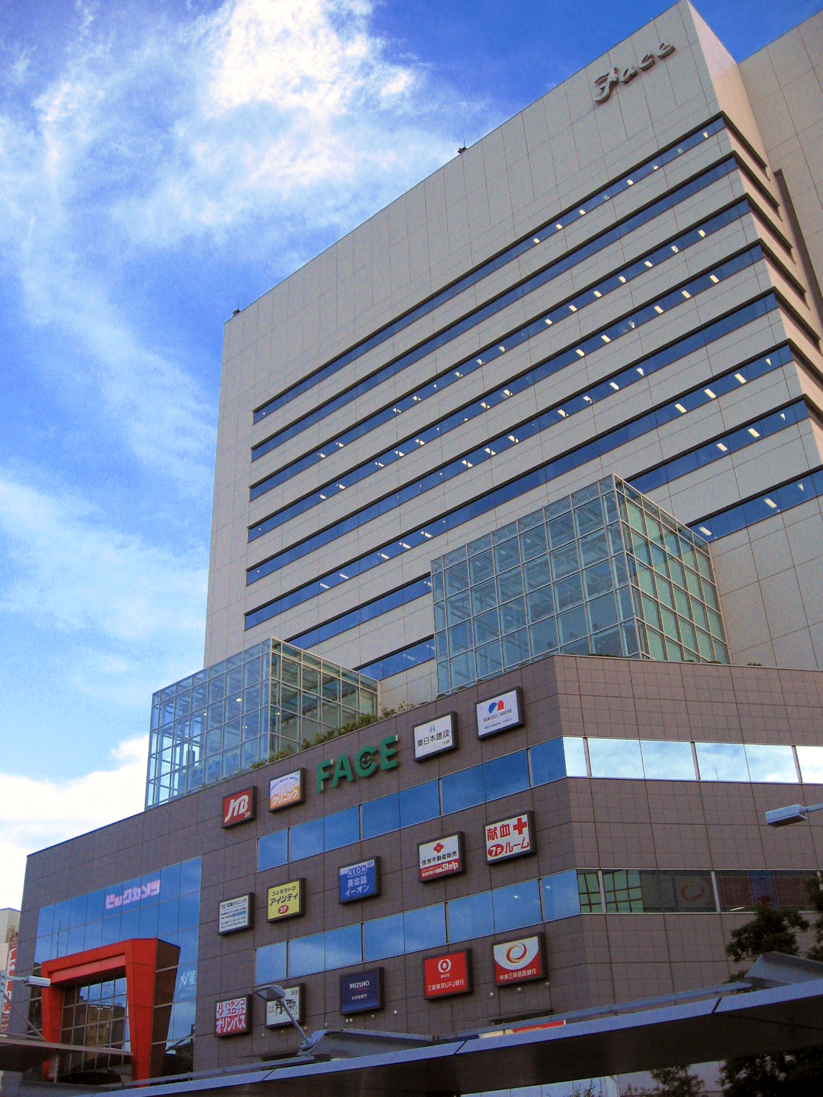 JR船橋駅前の再開発ビル、船橋フェイスビル（千葉県船橋市）。ビックカメラなどが入る。